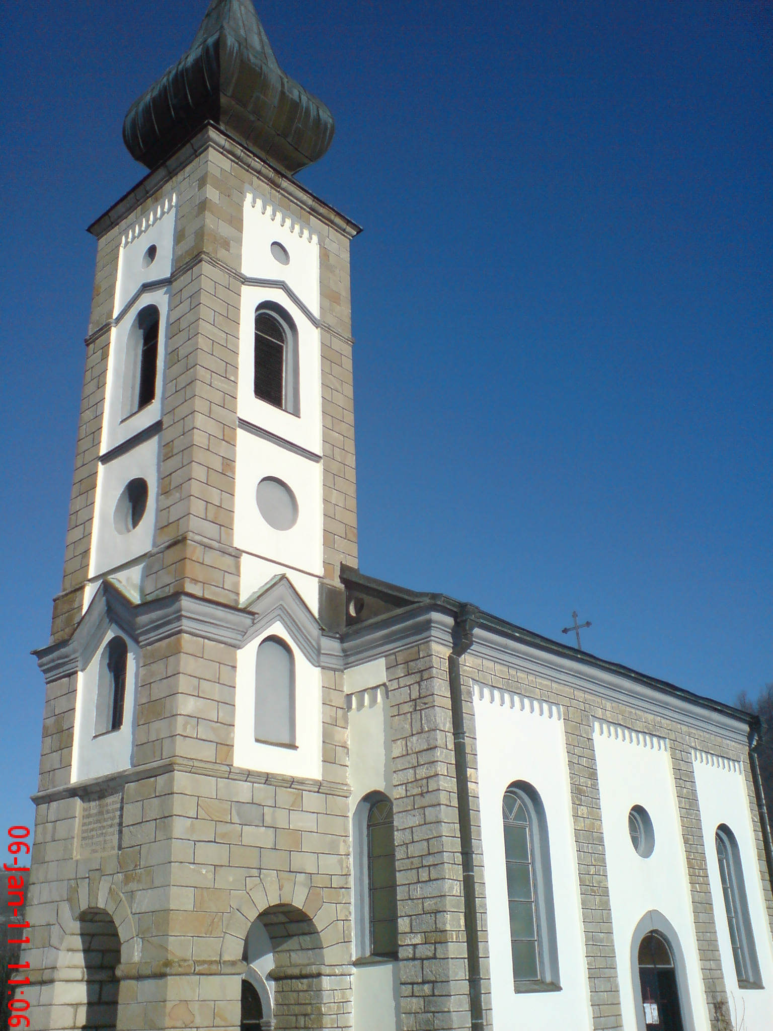 Crkva Sv.apostola Petra i Pavla u Koprivnu